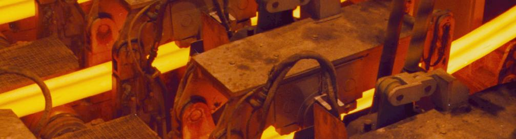 Detalle de fabricacion de Palanquilla en una colada continua de una Aceria